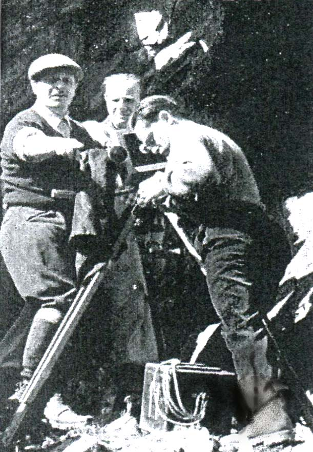 Quelli della montagna (Vergano + Blasetti, 1943) - Blasetti sul set